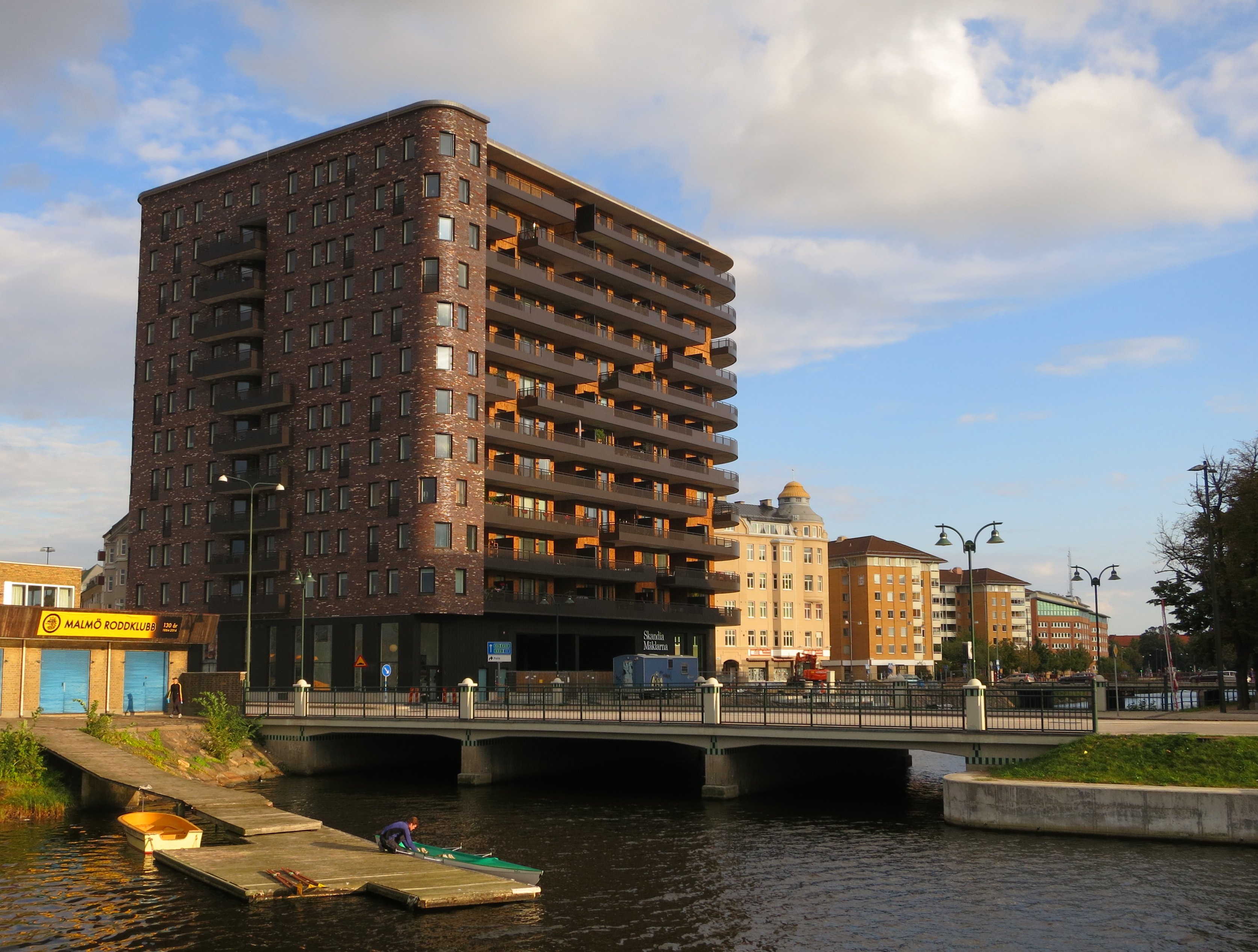 Slussen, Malmö